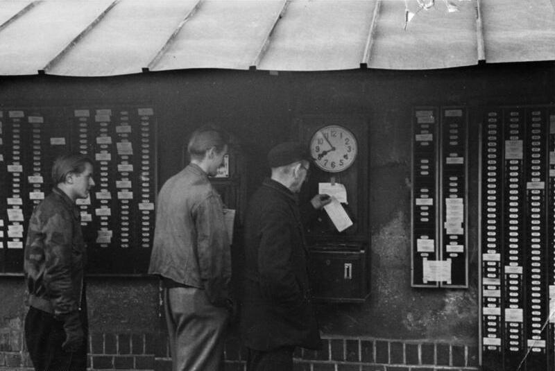 Dresden, Transformatoren- u. Roentgen-Werk, Anmeldung ADN-ZB/Archiv Um 8h beginnt die Schicht - Familie Moritz ist immer pünktlich - aber sie wohen auch nur ein paar Schritte vom Werk. Transformatoren- u. Roentgen-Werk in Dresden